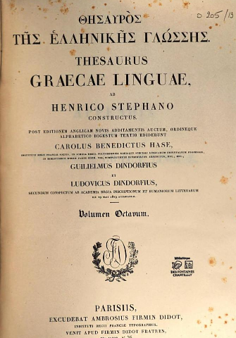 Thesaurus Graecae Linguae Henricus Stephanus Secundus (1528-1598), Henri Estienne (1528-1598)